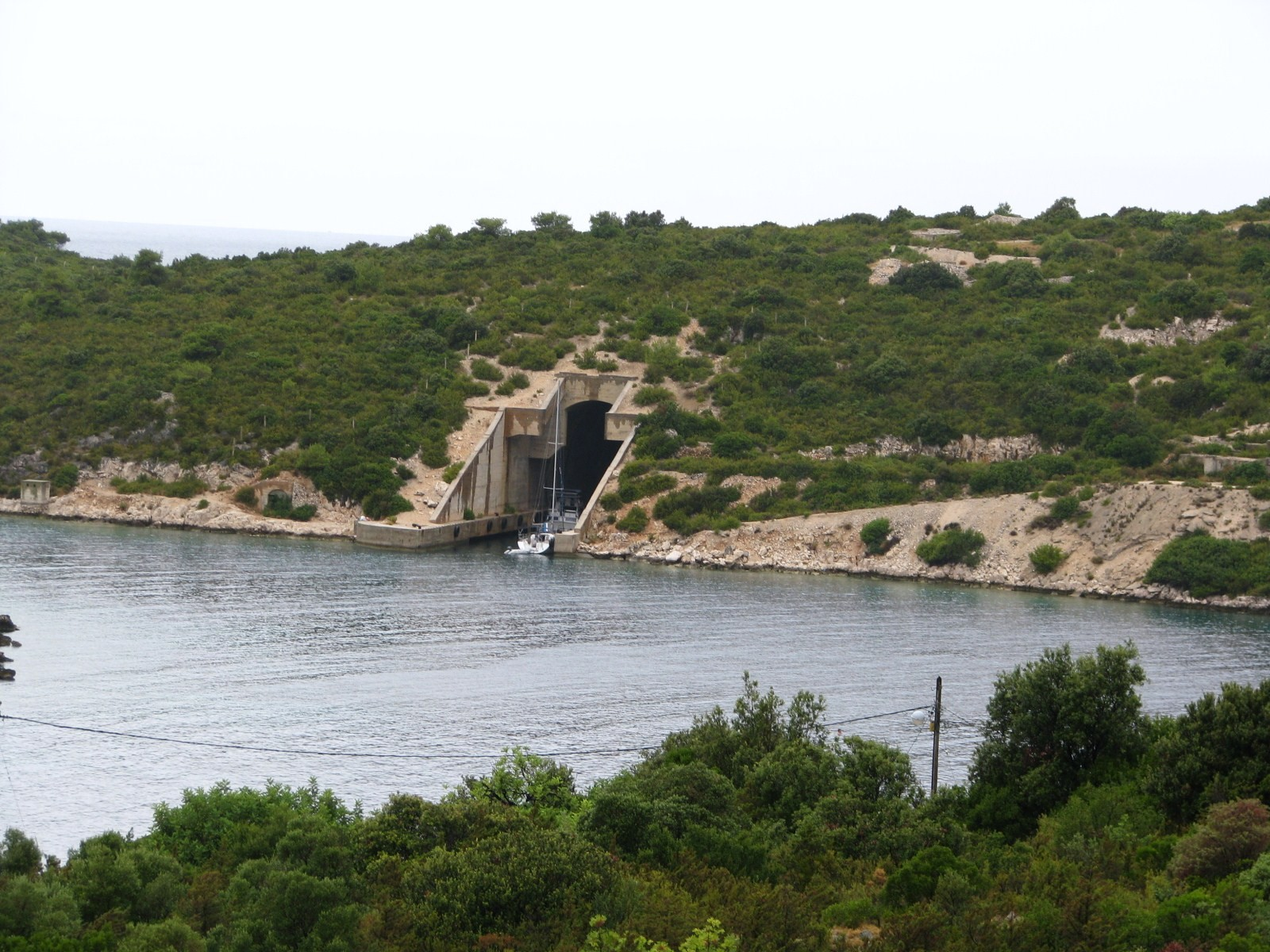 Potkop "Parja" – otok Vis